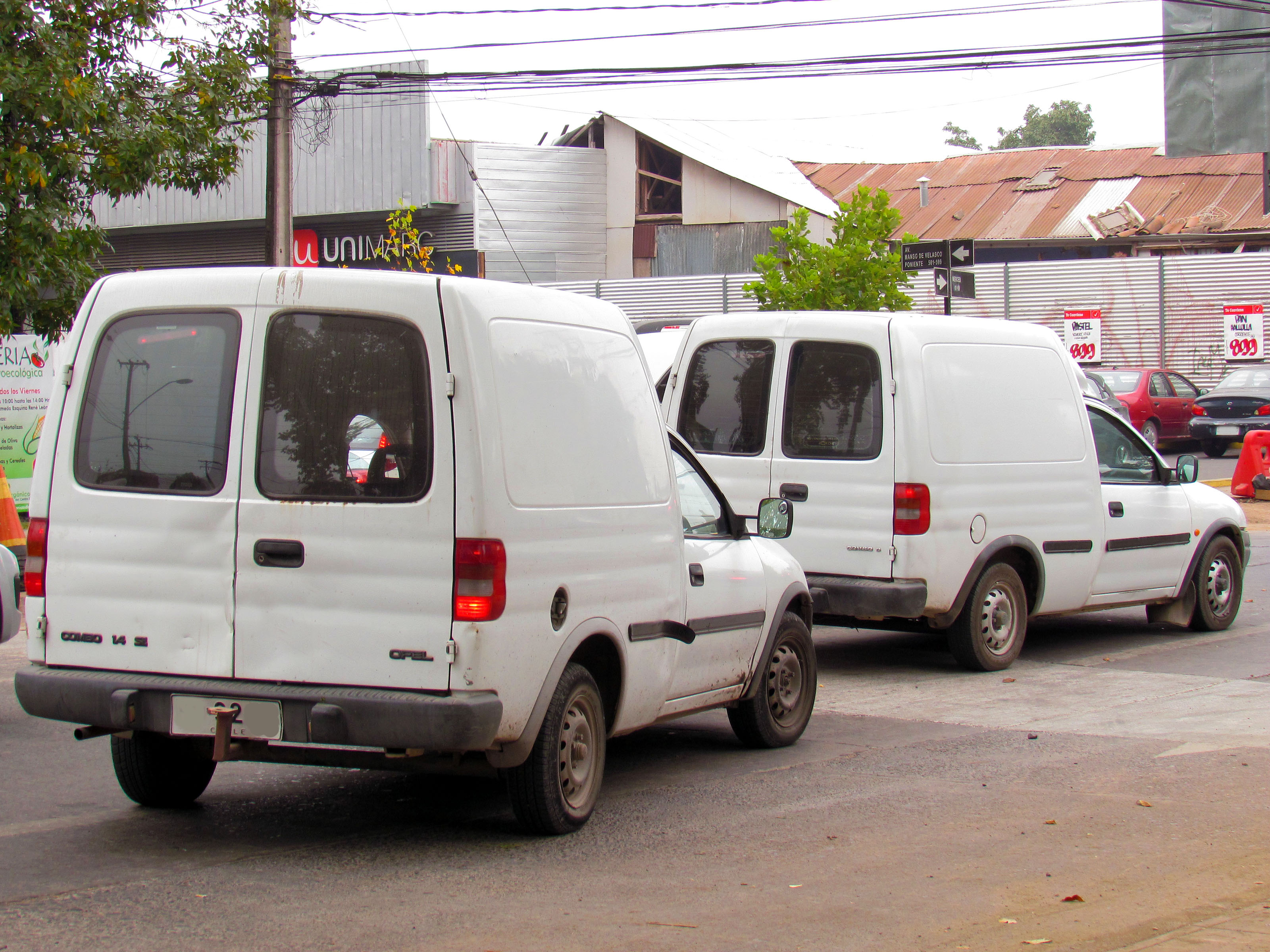 Opel and Chevrolet Combo '99